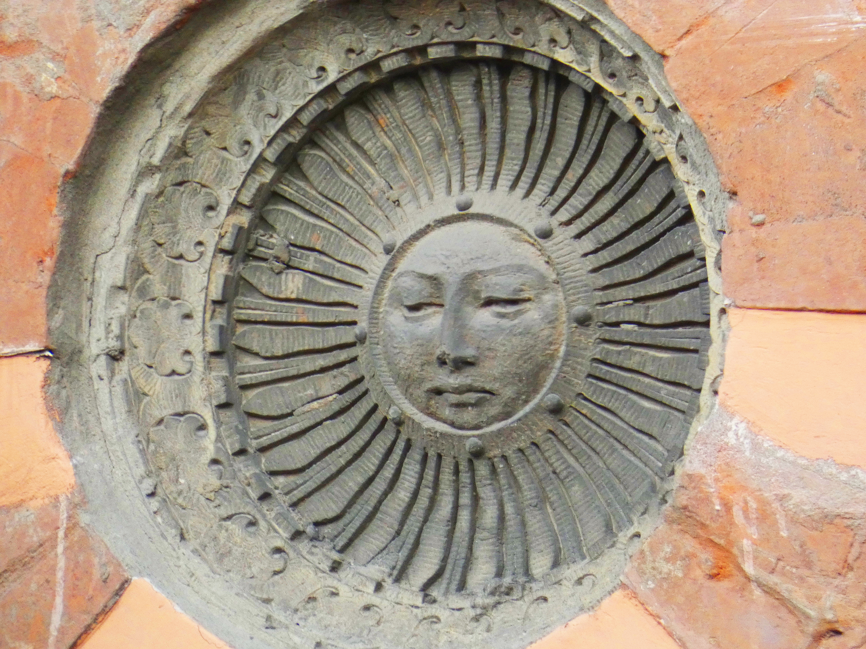 Декор. Будинок економічної школи, де в 1937–1941 роках містилась 13-та артилерійська спецшкола, Київ, вул. Ярославів Вал, 40